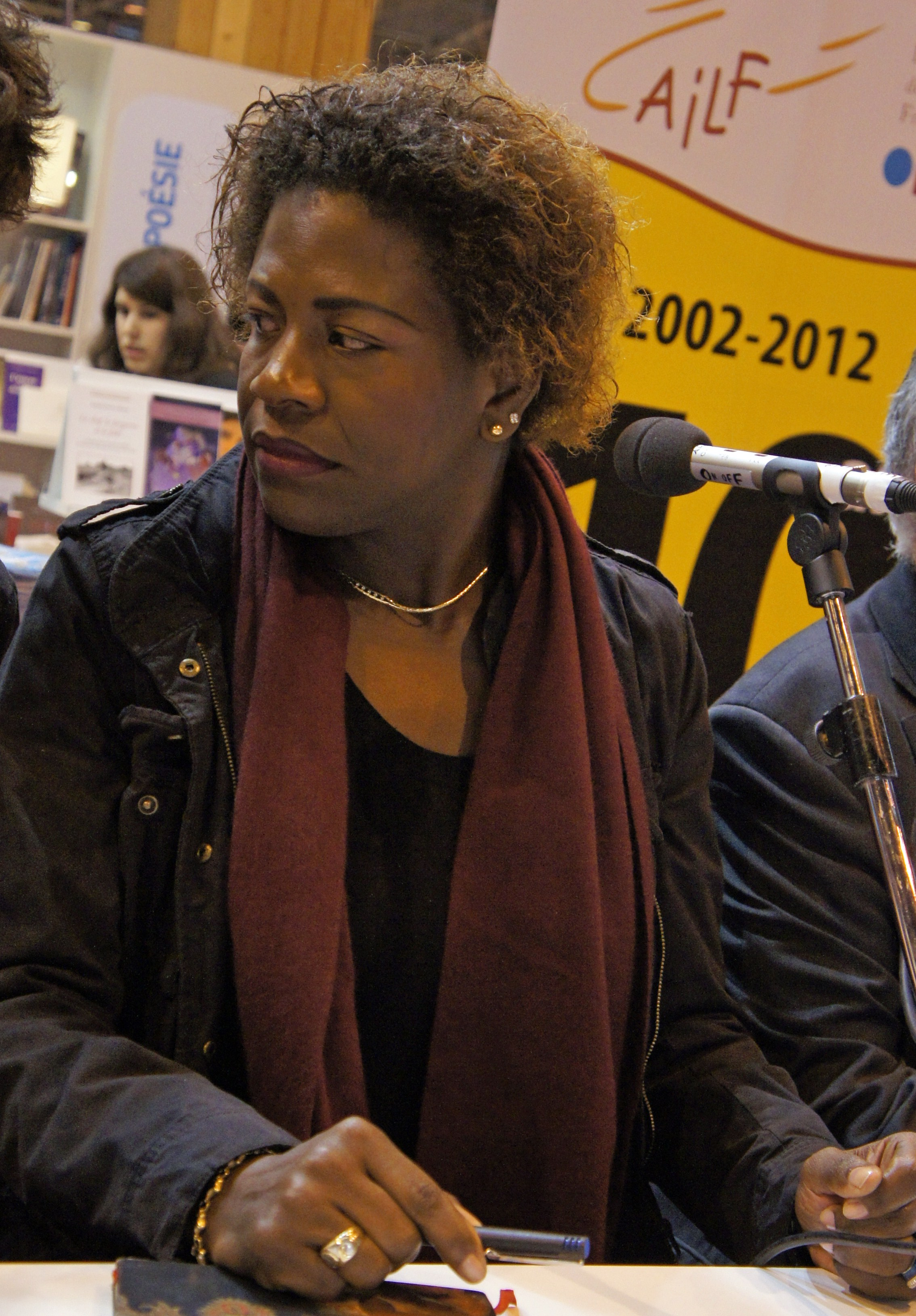 Auteure poètesse et journaliste, Emmelie Prophète-Milcé au salon du livre.